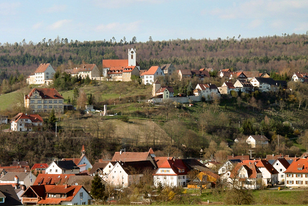 Stadt Aach im Hegau vom Süden aus Fotografiert Fotograf/Zeichner: Peter Stein Datum: 2003-04-08